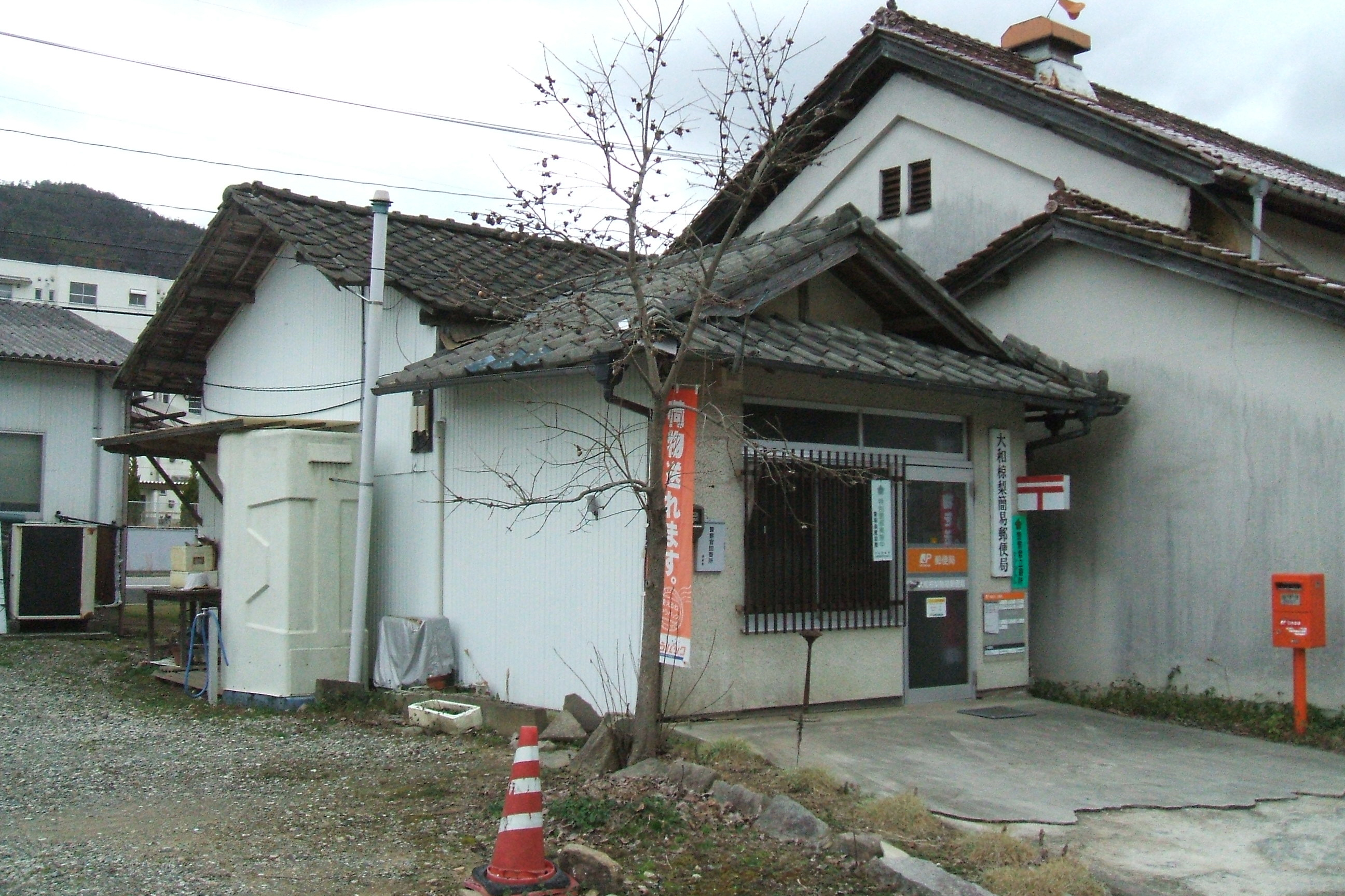 広島県三原市大和町椋梨にある大和椋梨簡易郵便局の外観。